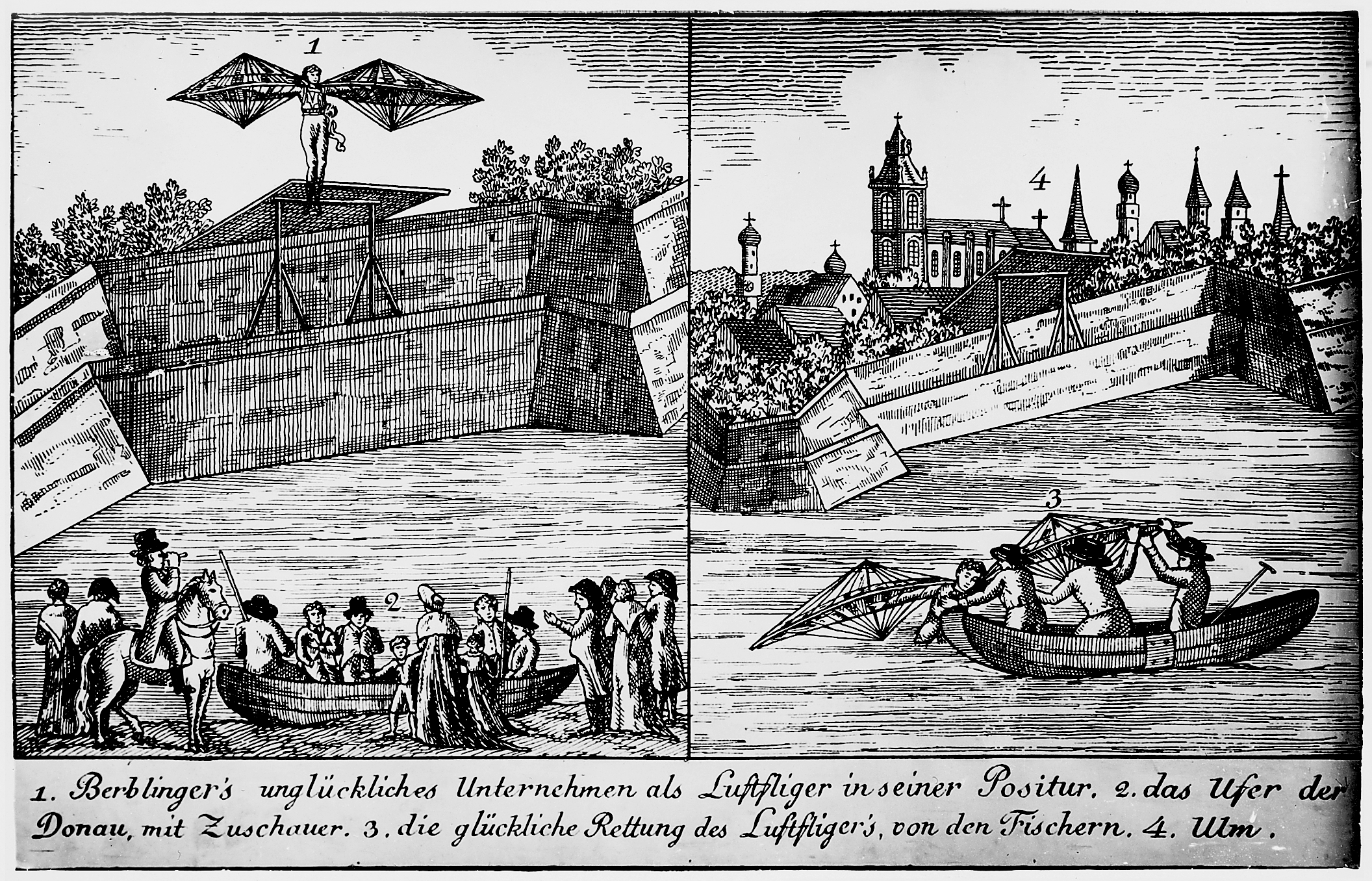 Undatierter Kupferstich des Flugversuchs Berblingers an der Adlerbastei in Ulm. Stadtarchiv Ulm